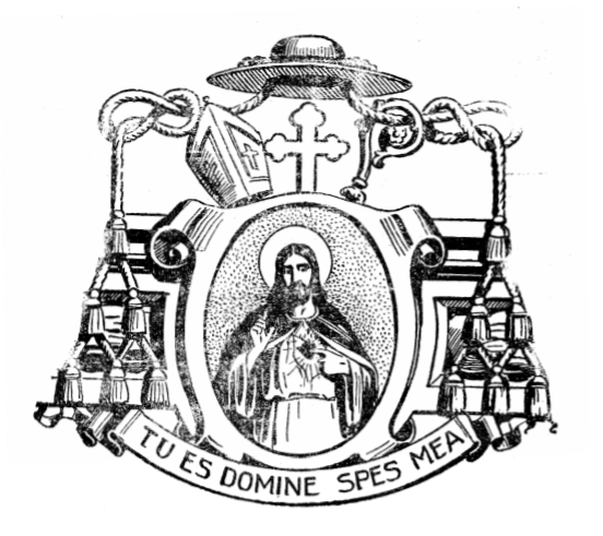 Escudo del obispo Pedro Rocamora